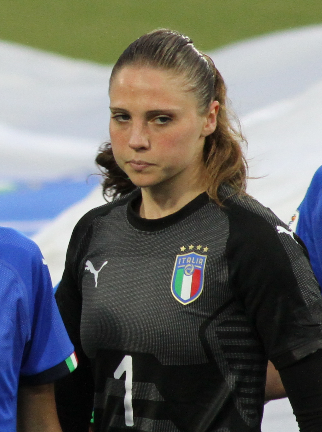 Laura Giuliani, portiere della nazionale di calcio femminile dell'Italia, durante l'incontro Italia-Belgio del 10 aprile 2018 allo stadio Paolo Mazza di Ferrara.